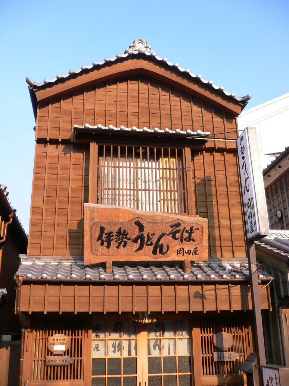 Ise udon restaurant Okadaya